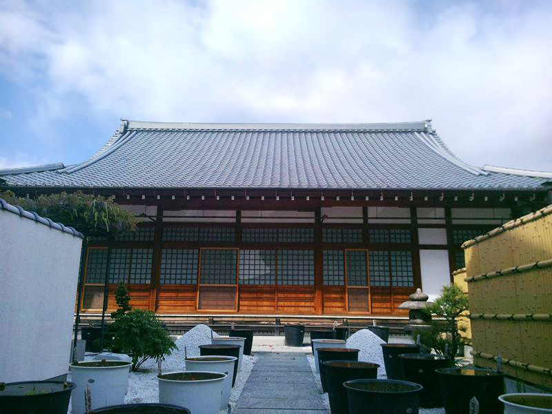 japanese zen temple